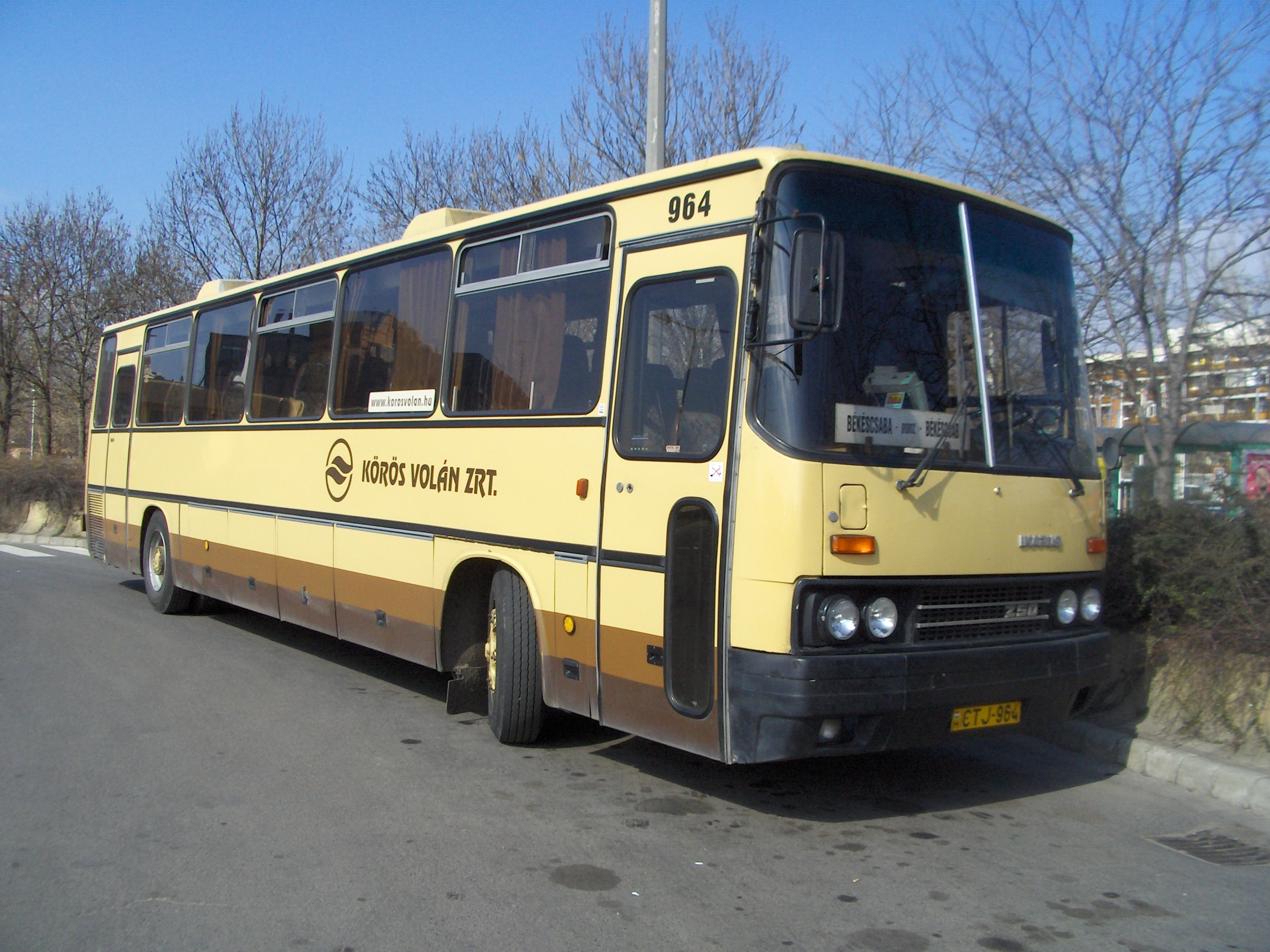 Ikarus 250.59 Békéscsabán